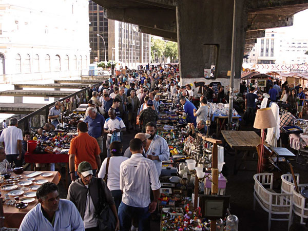 Feira de Antiguidades da Praça XV, quando ocorria sob o Elevado da Perimetral.